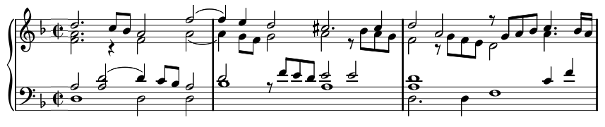 Début de la Pavana Lachrymae de Byrd, Fitzwilliam Virginal Book n° 121